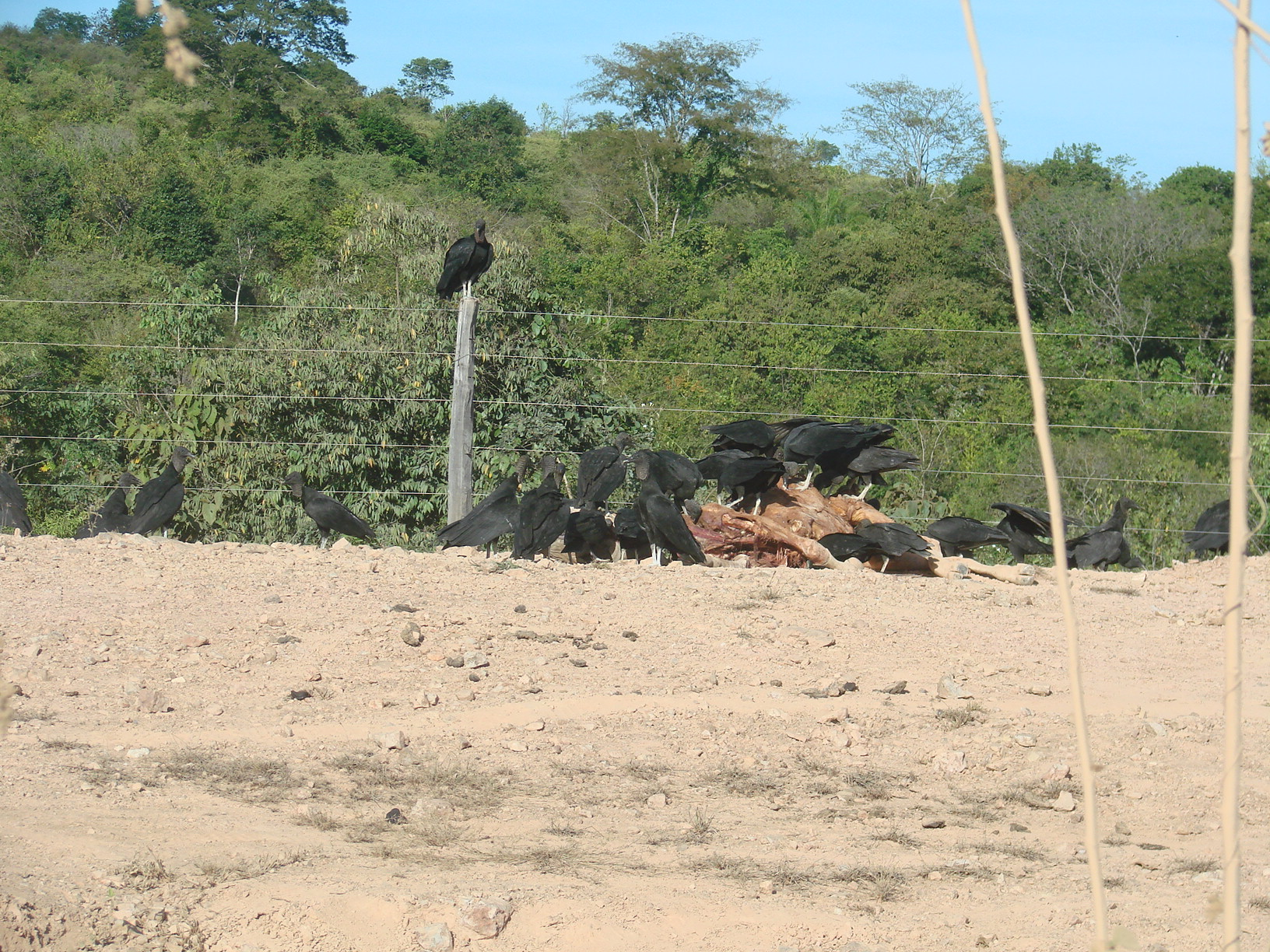 Urubus-de-cabeça-preta alimentando-se de carcaça bovina no cerrado mato-grossense